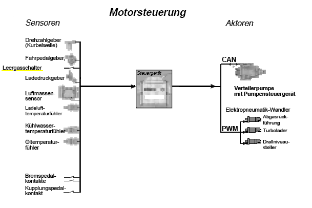 Schema Motorsteuerung (Leergasschalter)